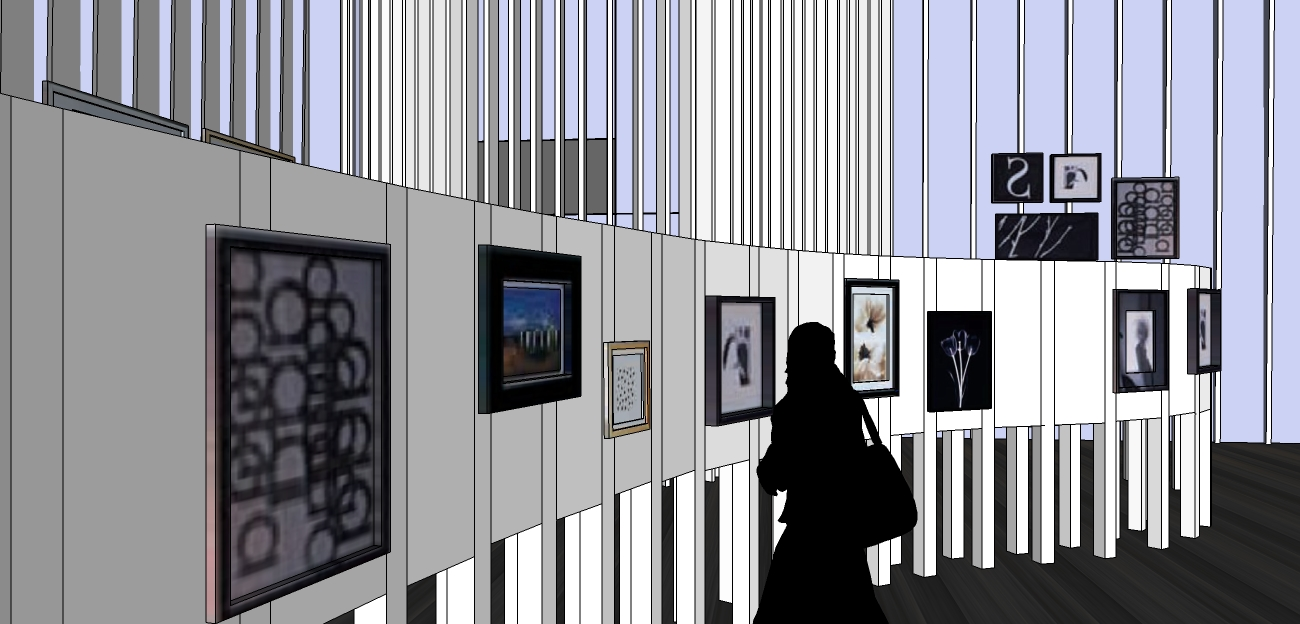 Template:Screenshotcopyrighted